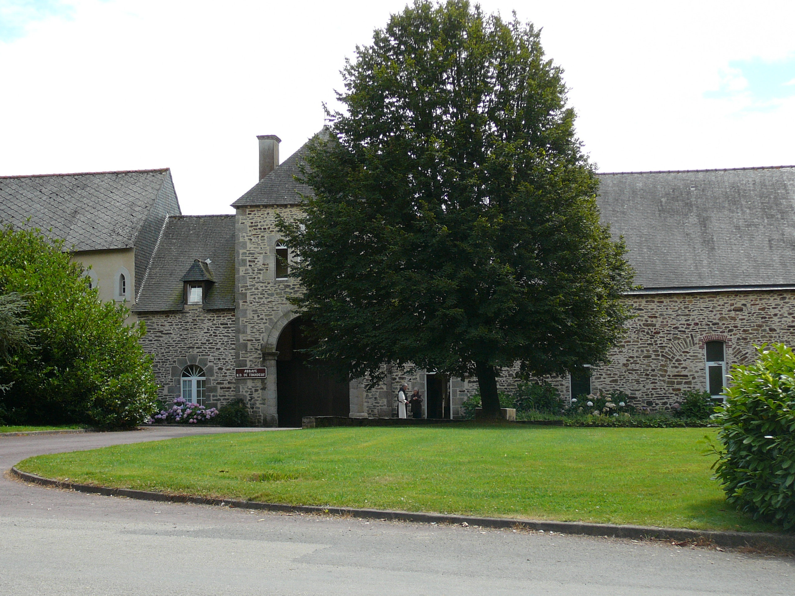 Entrée de l'abbaye de timadeuc, Morbihan, Bretagne, France.